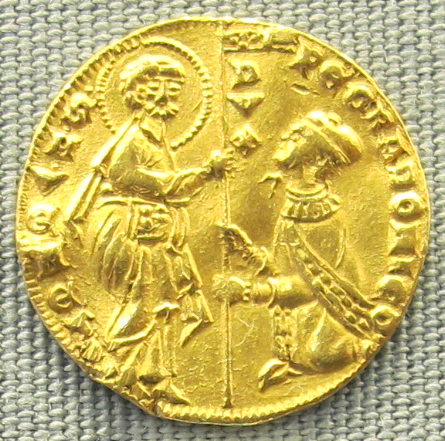 Venezia, ducato (zecchino) di pietro gradenigo, 1289-1310